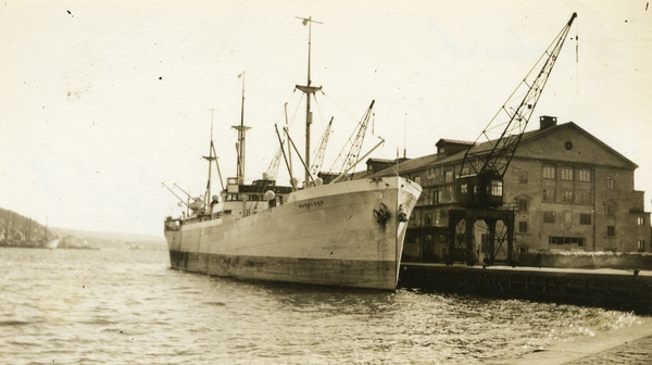 M/S Borgland (b. 1918, A/S Akers mek. Verksted, Kristiania)